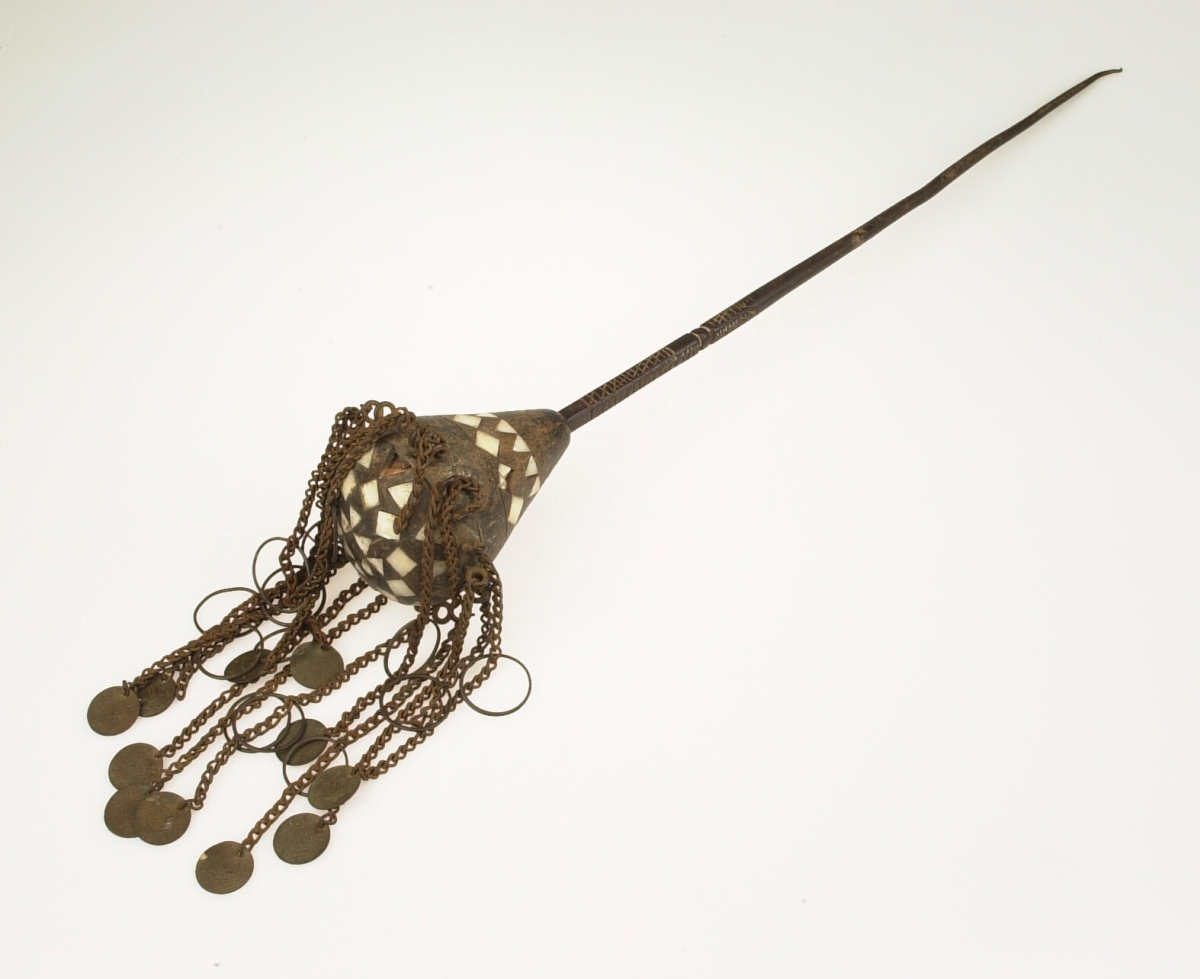 Op de tiende dag van de maand Muharram in het jaar 61 van de islamitische jaartelling (680 na Christus) stierf Hussein, de zoon van Ali, een tragische dood in de strijd tegen de soennieten. De dood van Hussein werd de belangrijkste gebeurtenis in de sji'ietische geschiedenis. Omdat zijn dood onterecht was, beschouwen sji'ieten hem als een martelaar. Elk jaar herdenken de sji'ieten de dood van Hussein gedurende de eerste tien dagen van Muharram. Deze herdenking wordt Ashura genoemd en bestaat uit processies en rituelen. Het meest indrukwekkende ritueel vindt op de tiende dag plaats. Dan lopen de gelovigen in processies door het dorp of de wijk, terwijl ze al zingend ritmische bewegingen maken en zich met kettingen, touwen of stokken slaan. De rituelen van de processie zelf en de attributen die erbij gebruikt worden staan symbool voor de afschrikwekkende gebeurtenissen op het slagveld van Kerbela, waar Hussein de dood vond.